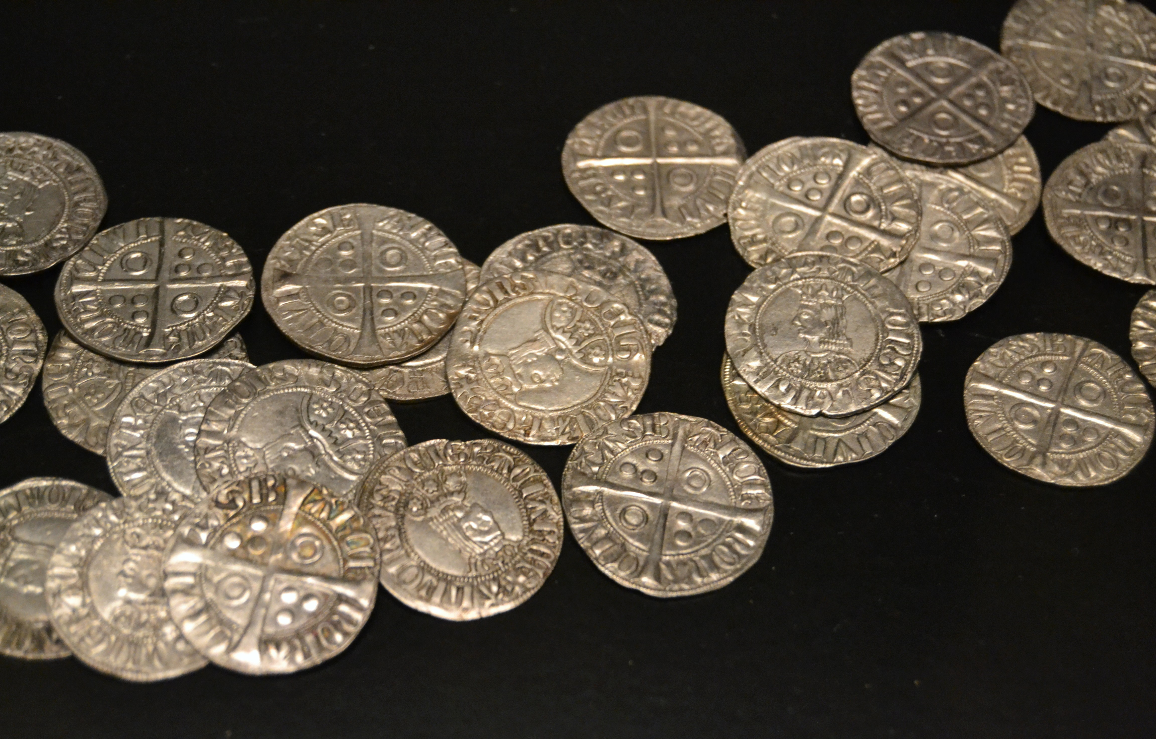 Croats de la seca de Barcelona, segles XIII - XIV, Museu de Prehistòria de València.